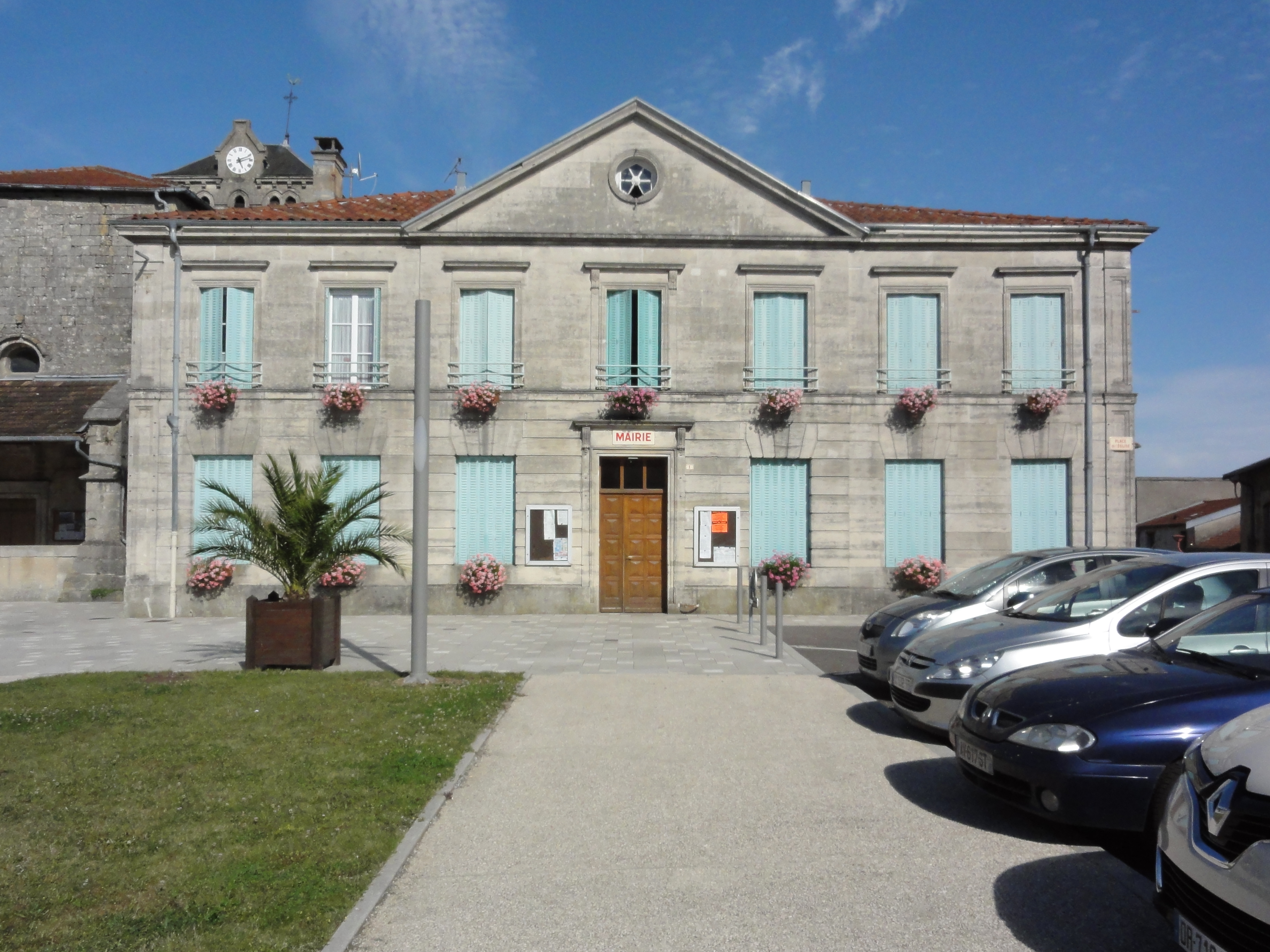 Aulnois-en-Perthois (Meuse) mairie